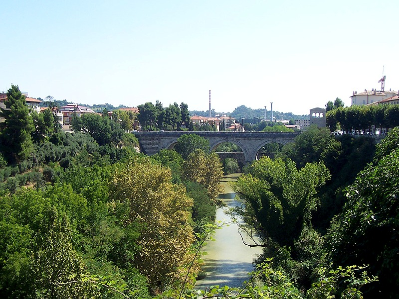 Ascoli Piceno - Fiume Tronto